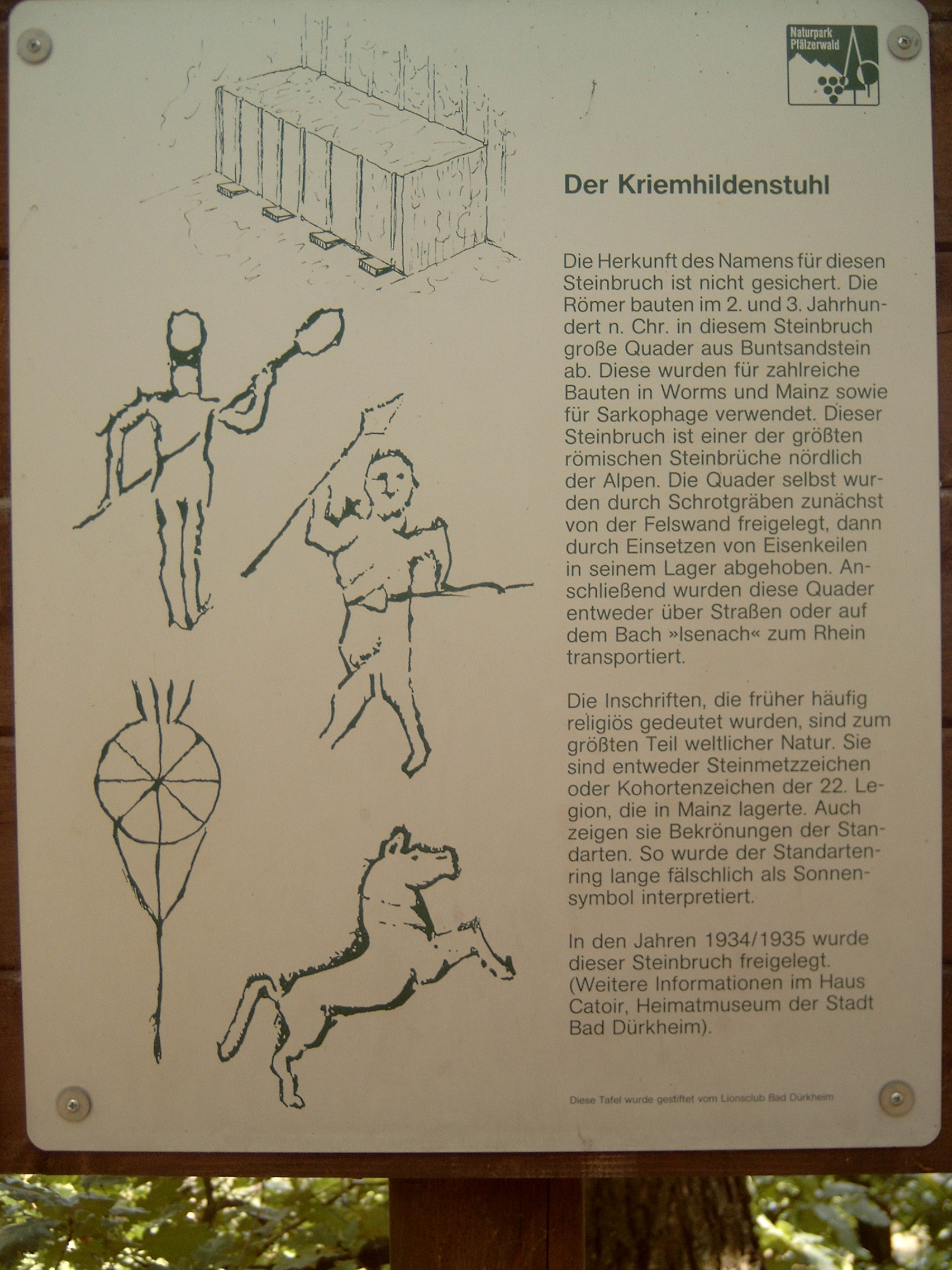 Tafel 1